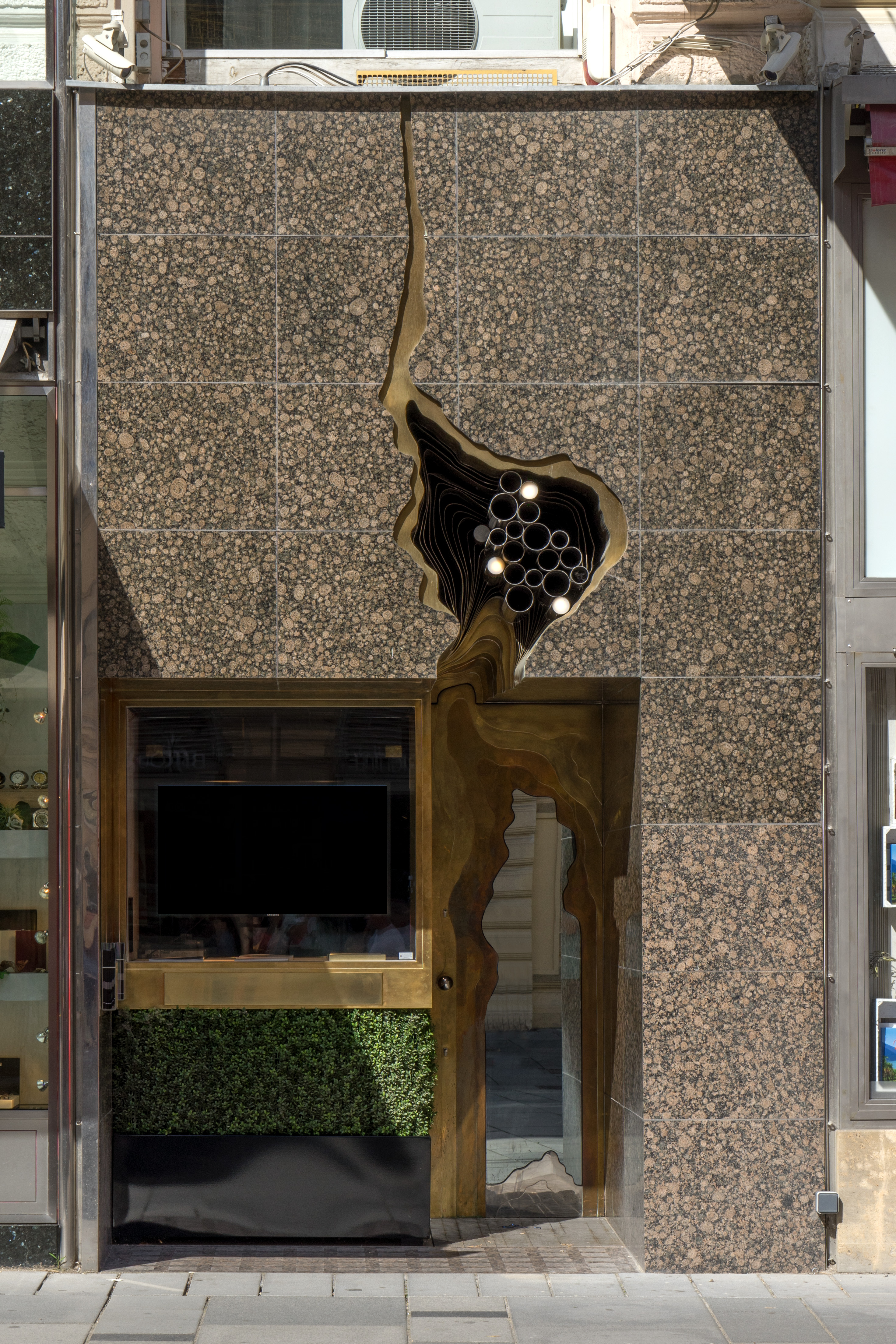 Schullin, Graben 26, Hans Hollein